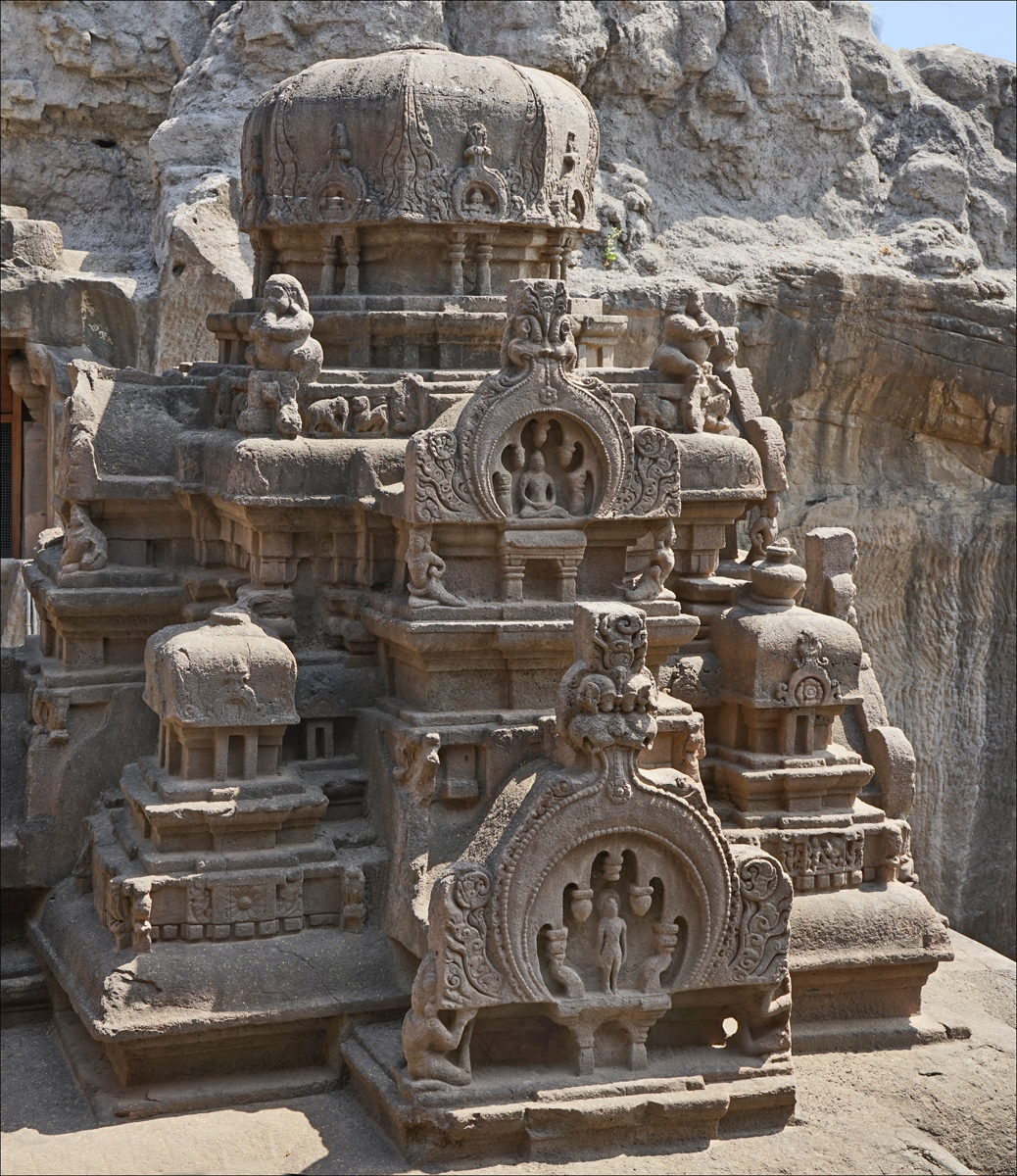 La grotte jaïne "Indra Sabha" (Ellora, Inde) La tour pyramidale du sanctuaire monolithique de la grotte 32 de culte jaïn à Ellora La tour pyramidale est composée de gradins ornés de répliques de sanctuaires en bois à toit en berceau, elle reflète la cosmogonie jaïn.